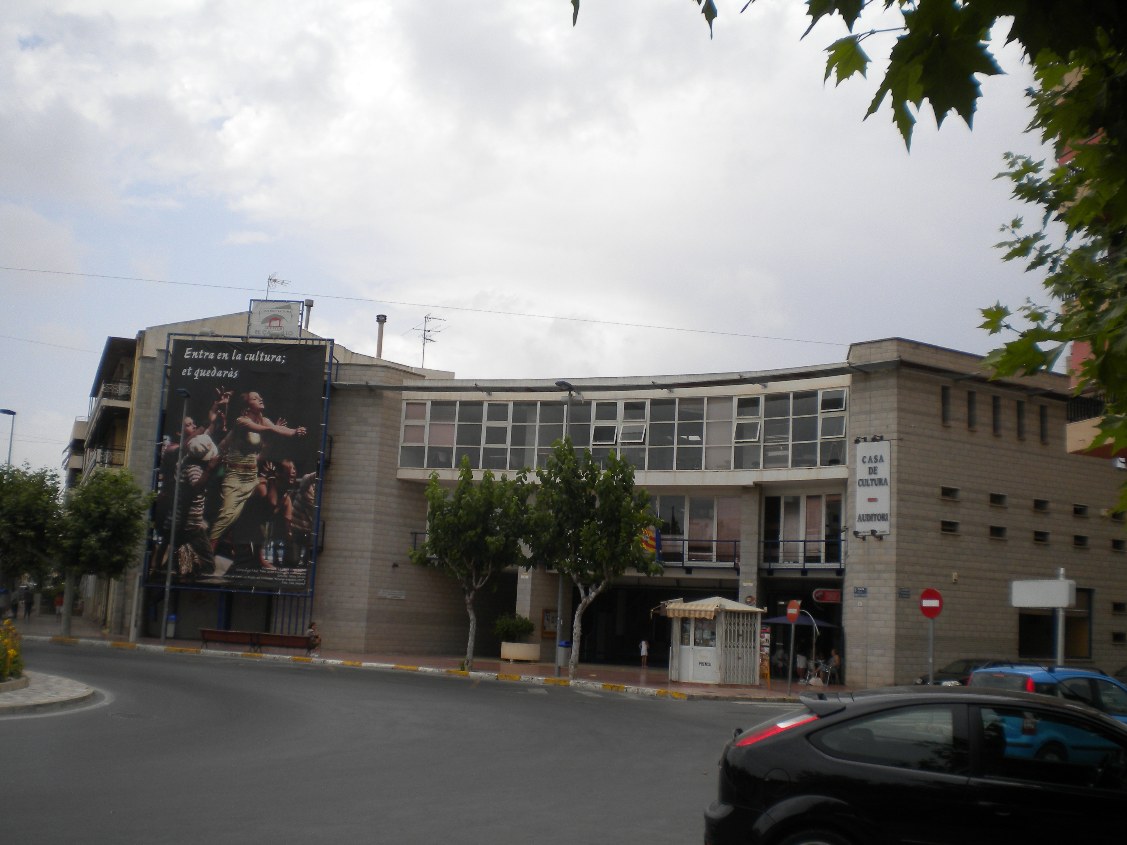 Casa de Cultura y Auditorio de El Campello (Alicante, España)